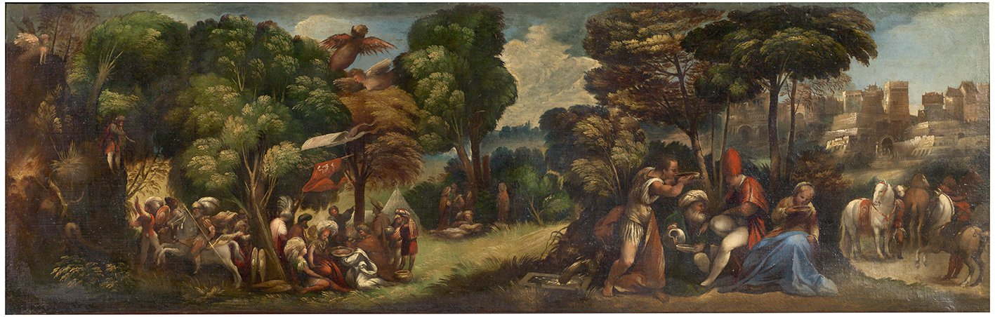 Huile sur toile 58,4 x 167,8 cm Madrid, Museo del Prado Photo : Museo del Prado